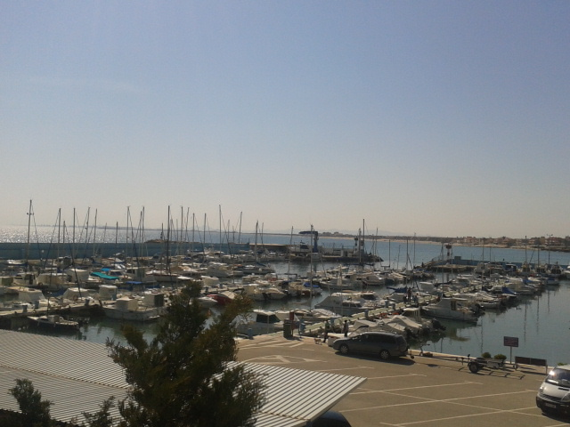 Puerto deportivo Torre Horadada (Pilar de la Horadada) Alicante